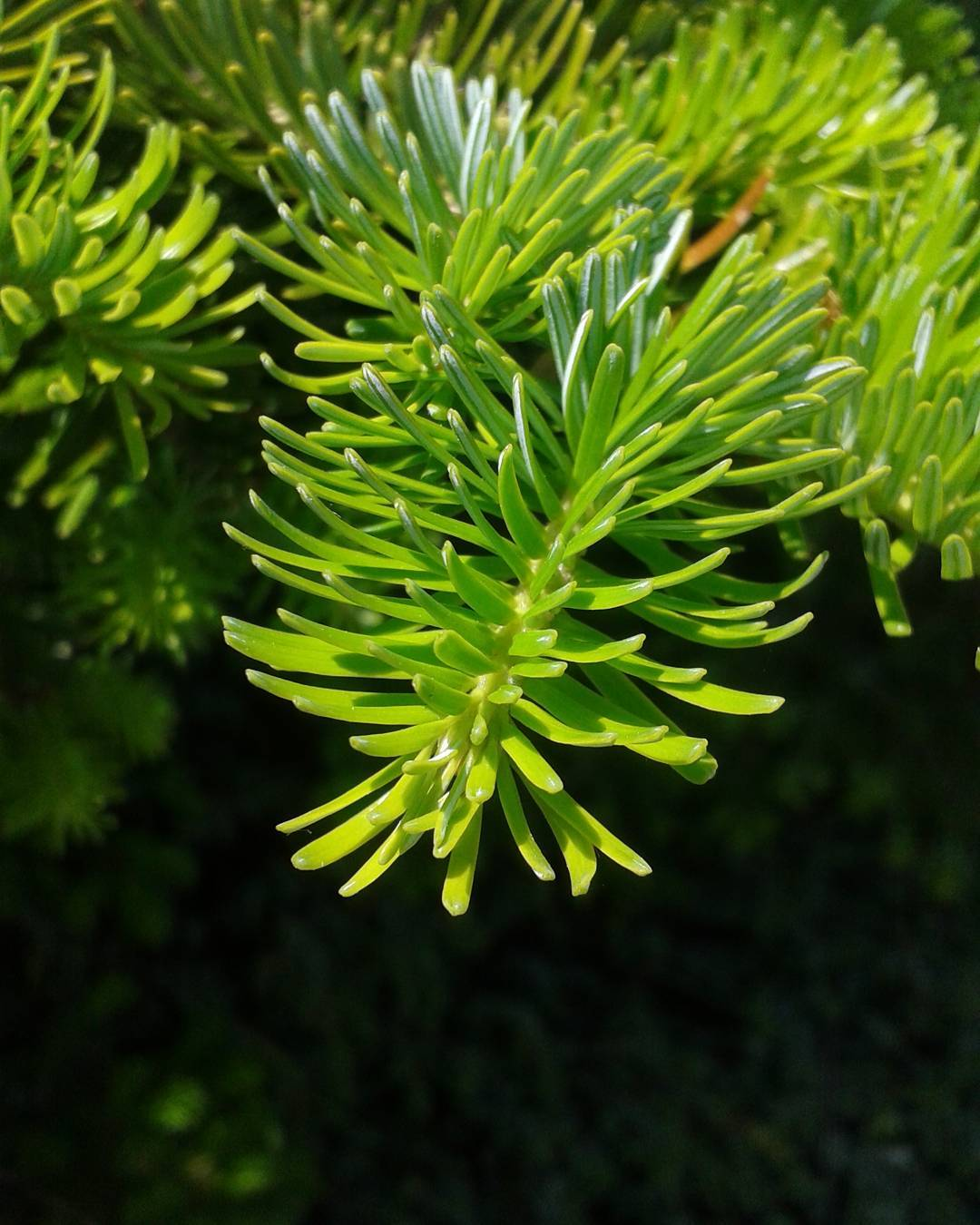 aiguilles de sapin, montagne de lure